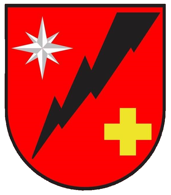 Brasão do Grupo de Operações de Socorro Tático, do Corpo de Bombeiros do Paraná.